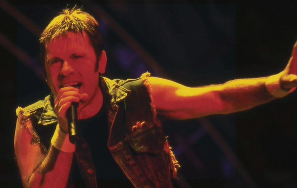 foto rappresentante Bruce Dickinson